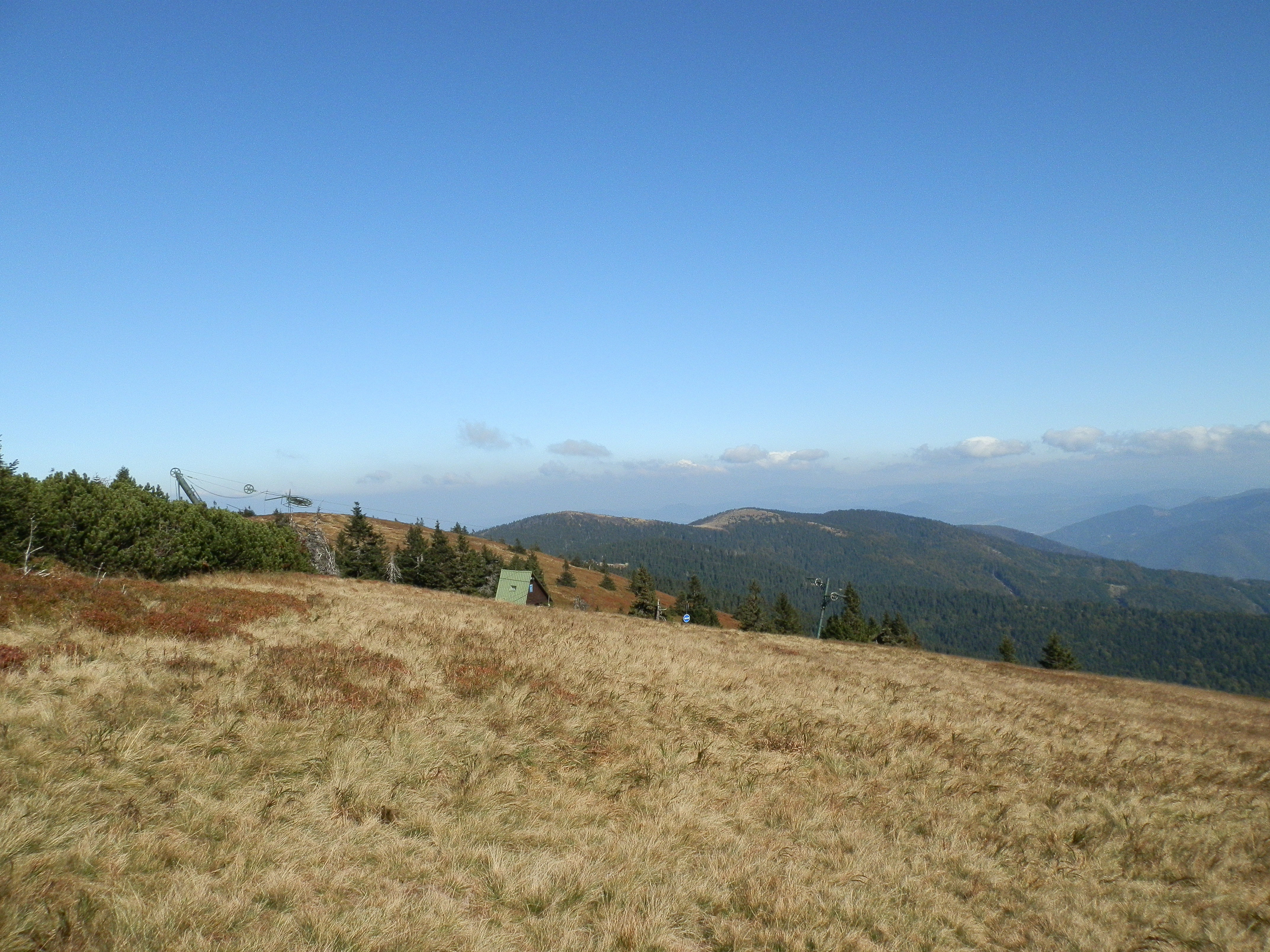 Zázrivá,Dlhá lúka a Minčol